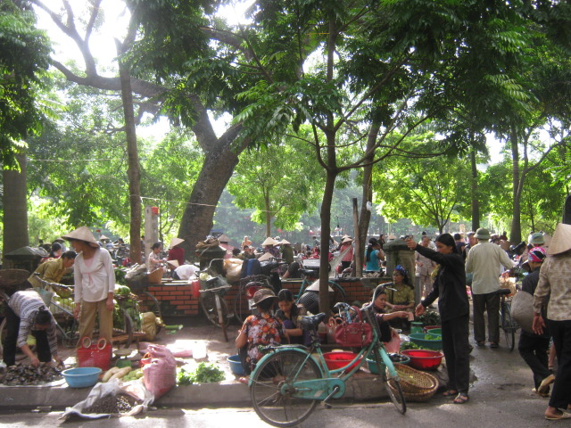 Khu thương mại tự do của chợ Rồng Ninh Bình, thành phố Ninh Bình